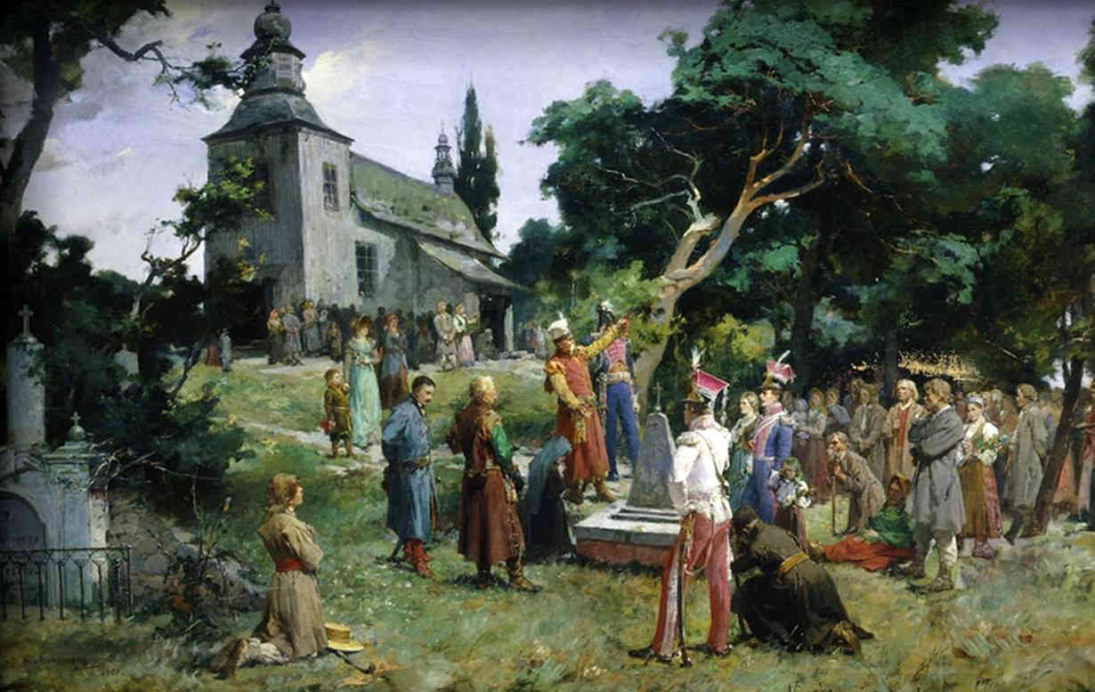 Казімір Альхімовіч. Вяртанне героеў